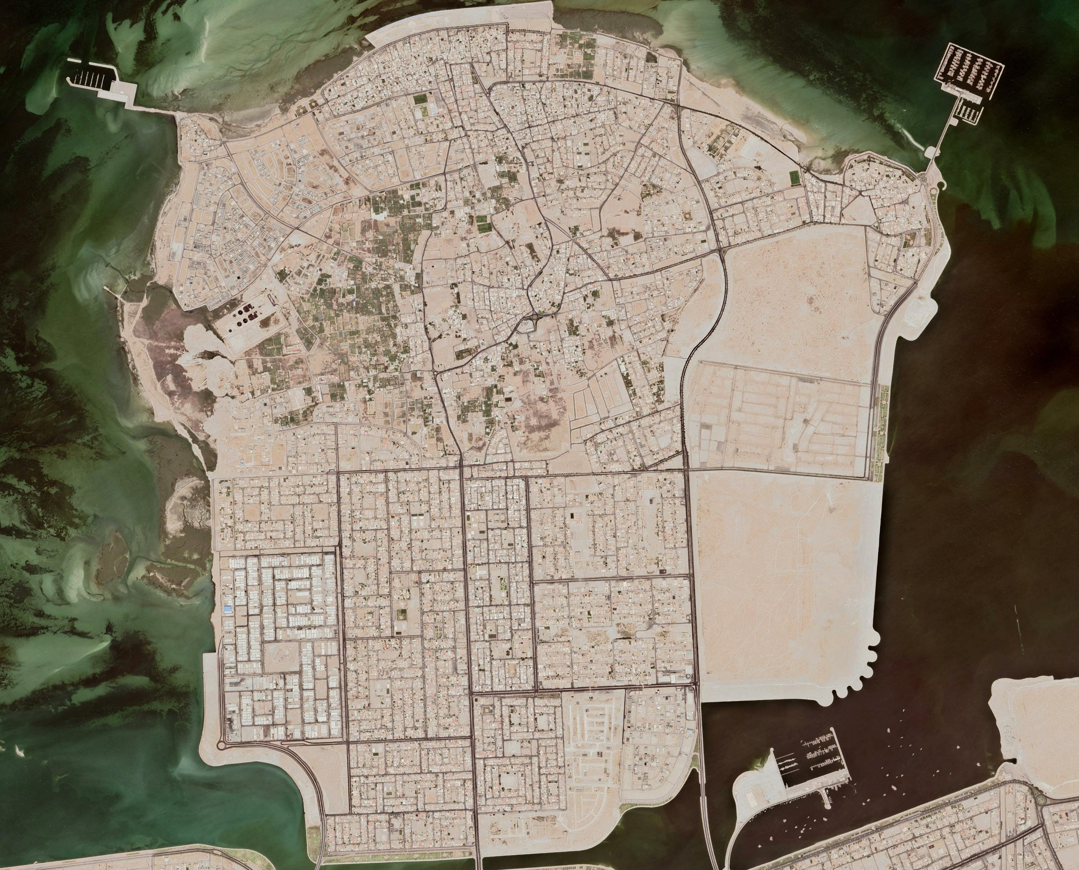 خريطة تقسيمات المناطق لجزيرة تاروت